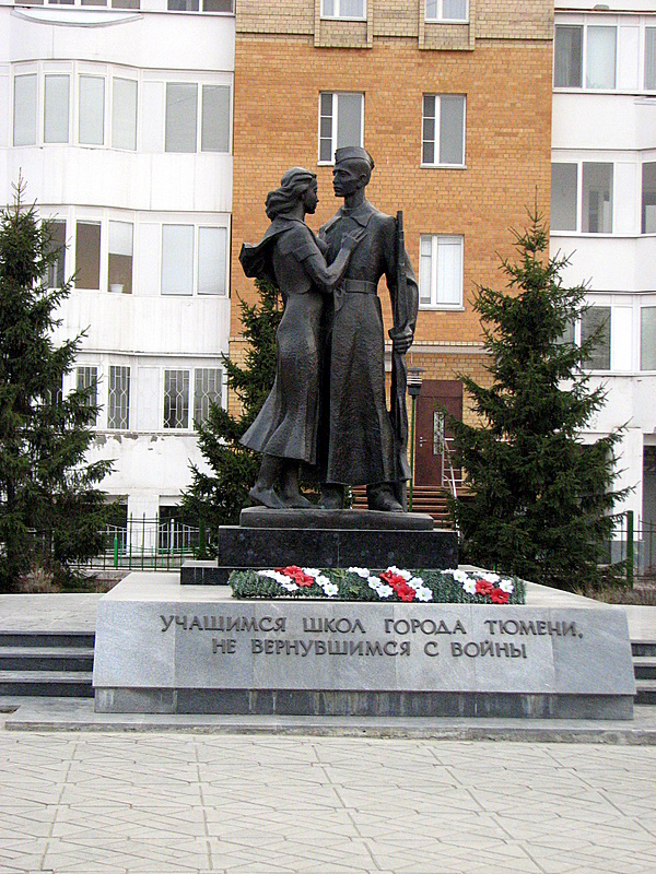 Памятник школьникам, не вернувшимся с войны. На ул. Республики (Тюмень), напротив главного корпуса ТюмГУ.